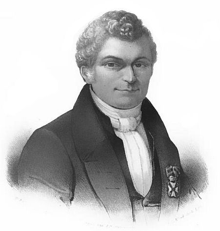 Jacob Carel van de Kasteele (1780-1835), o.a. Tweede Kamerlid